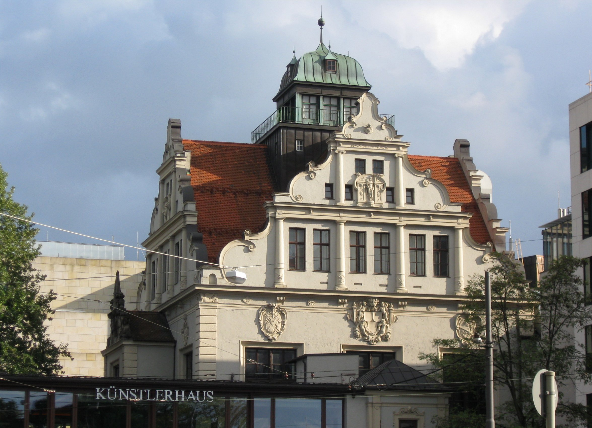 Lenbachplatz 8; Künstlerhaus, malerischer, städtebaulich wirkungsvoller Neurenaissancebau, 1896-1900 von Gabriel von Seidl; besteht aus dem hohen, zurückgesetzten Hauptbau und niedrigem Vorbau mit Restaurant; dazwischen malerischer Hof; Innenräume nur z. T. original erhalten, u. a. Treppenhaus sowie das Venezianische Zimmer im Nordpavillon des Restaurants.